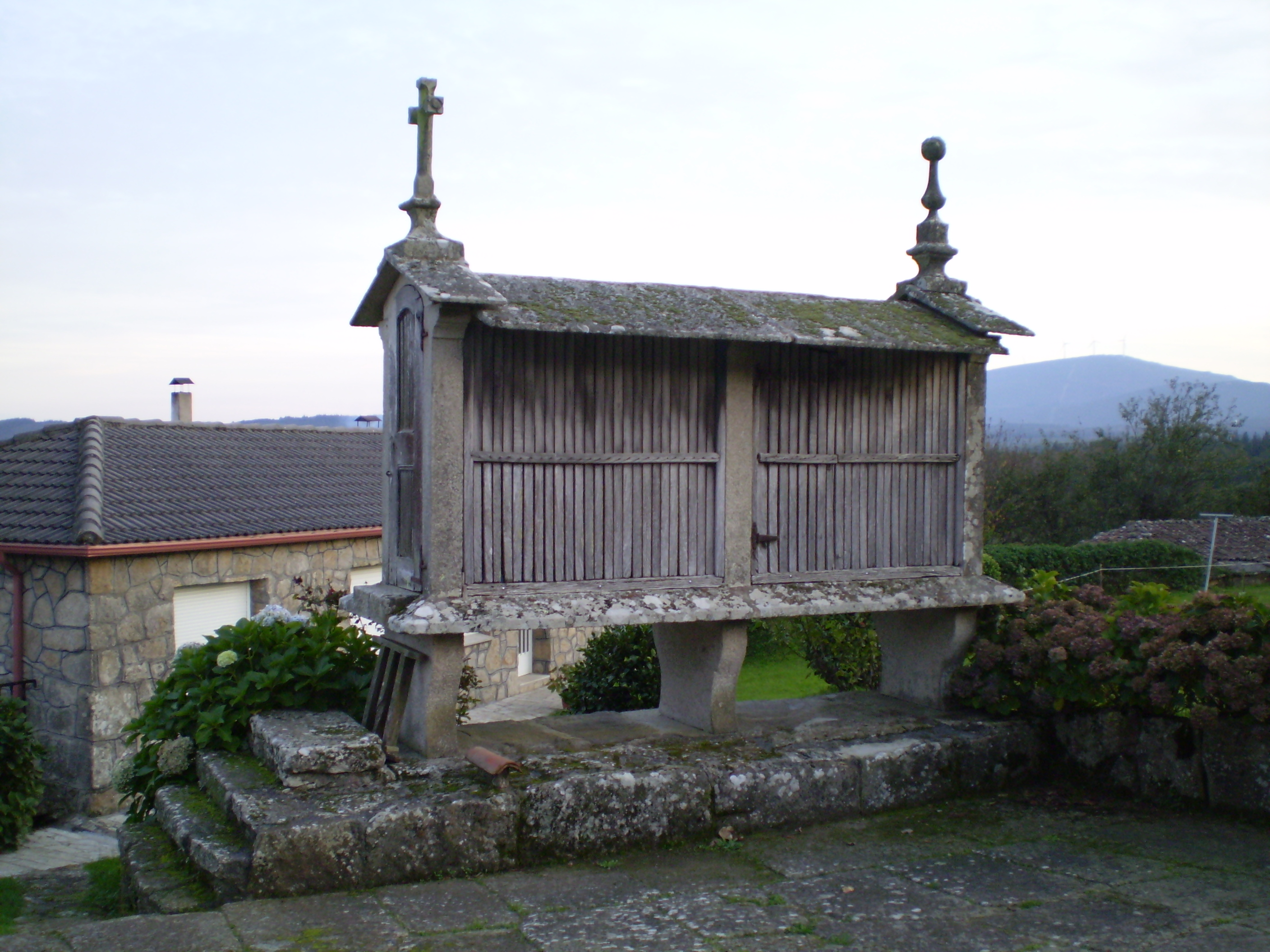 Horreo en Facha (Antas de Ulla)